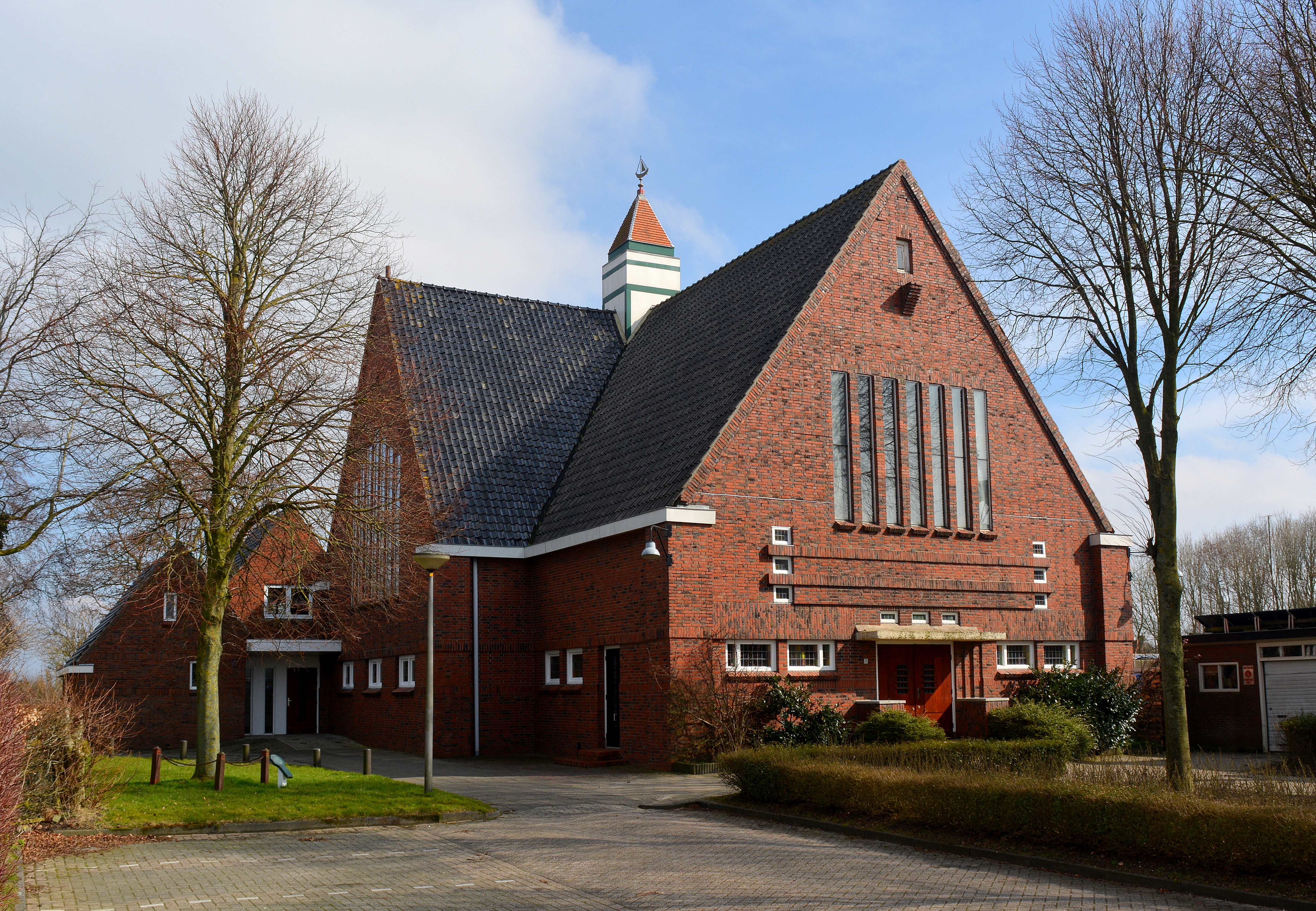 Nij Altoenae, Tsjerke tusken de Diken (Grifformearde tsjerke)